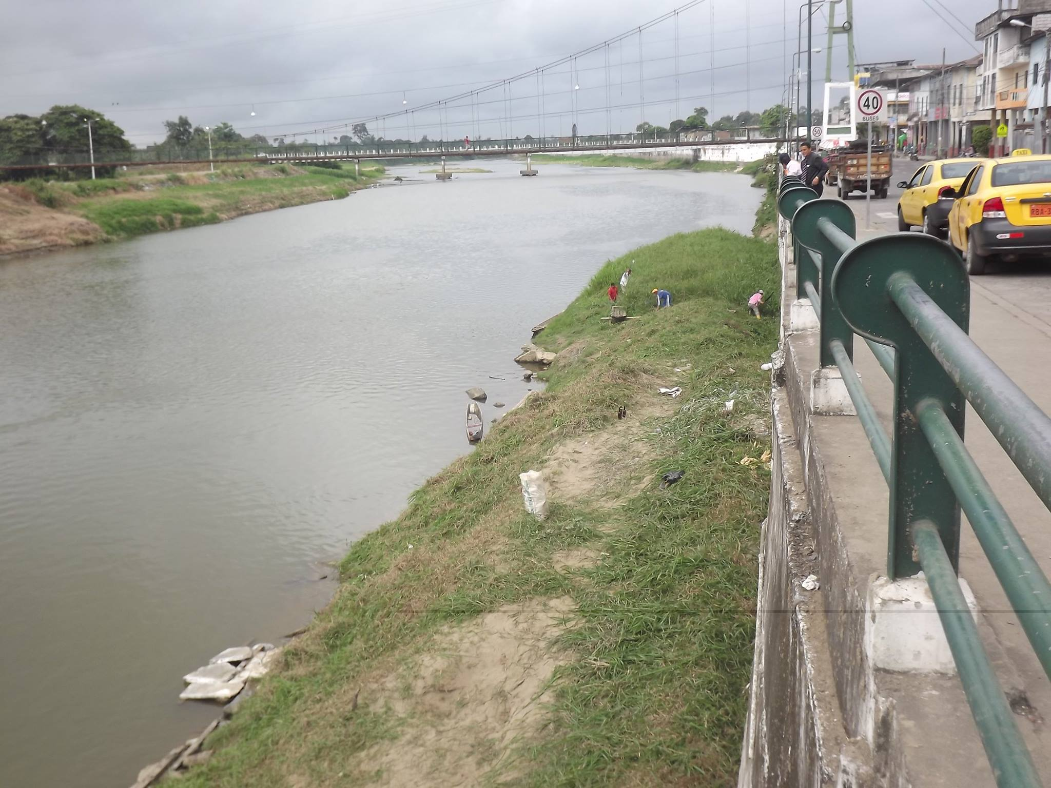 Malecón de Mocache